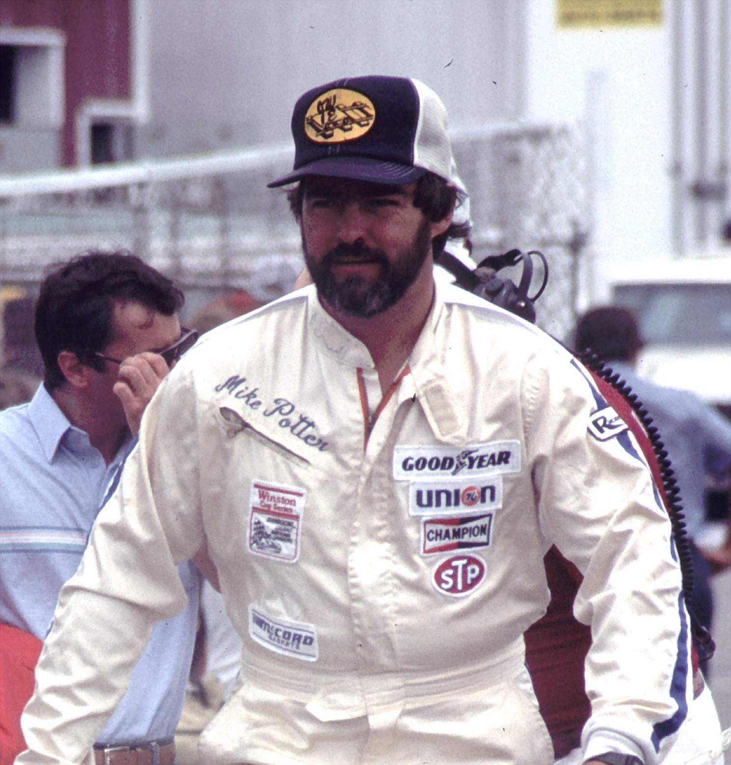 NASCAR driver Mike Potter in 1985. Photo By Ted Van Pelt